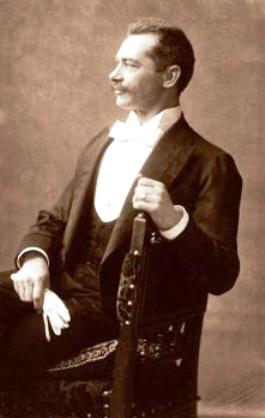 Eisenhut Ferenc (Franz Xaver Eisenhut) magyarországi festő.